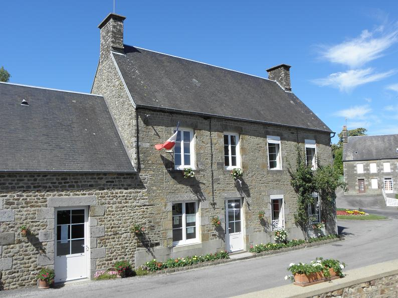 Mairie de Saint-Loup (50).